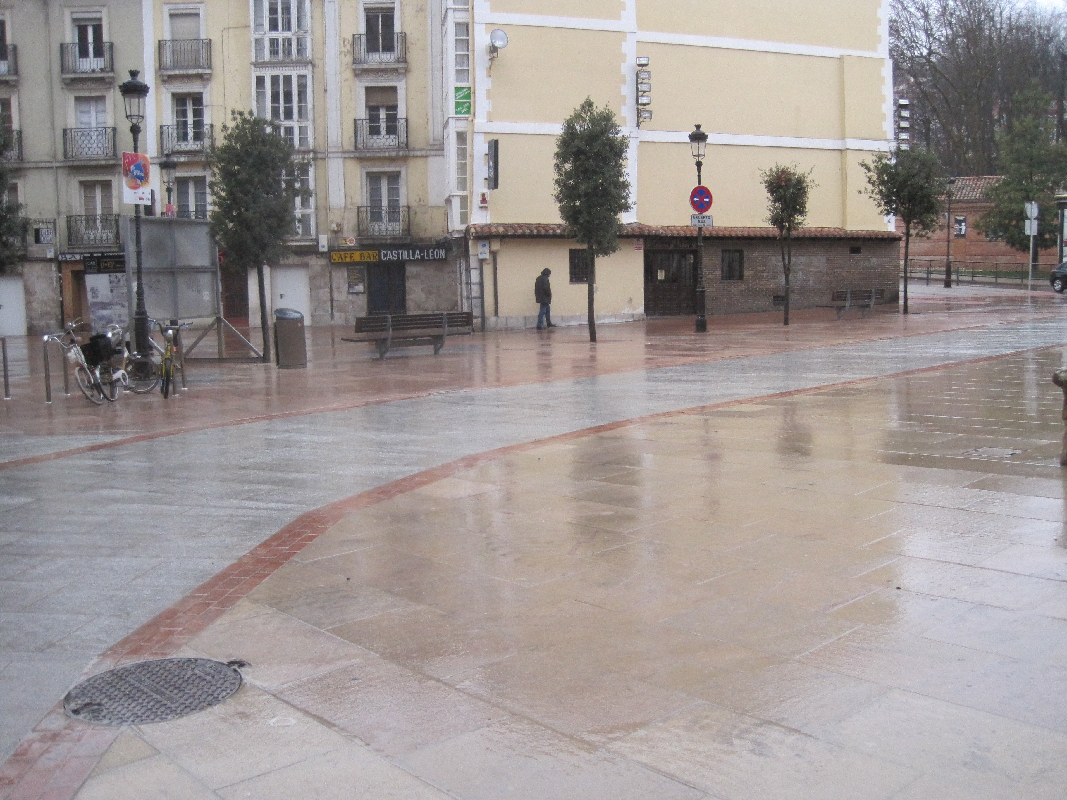 Vista de una de las últimas peatonalizaciones de la Plaza.